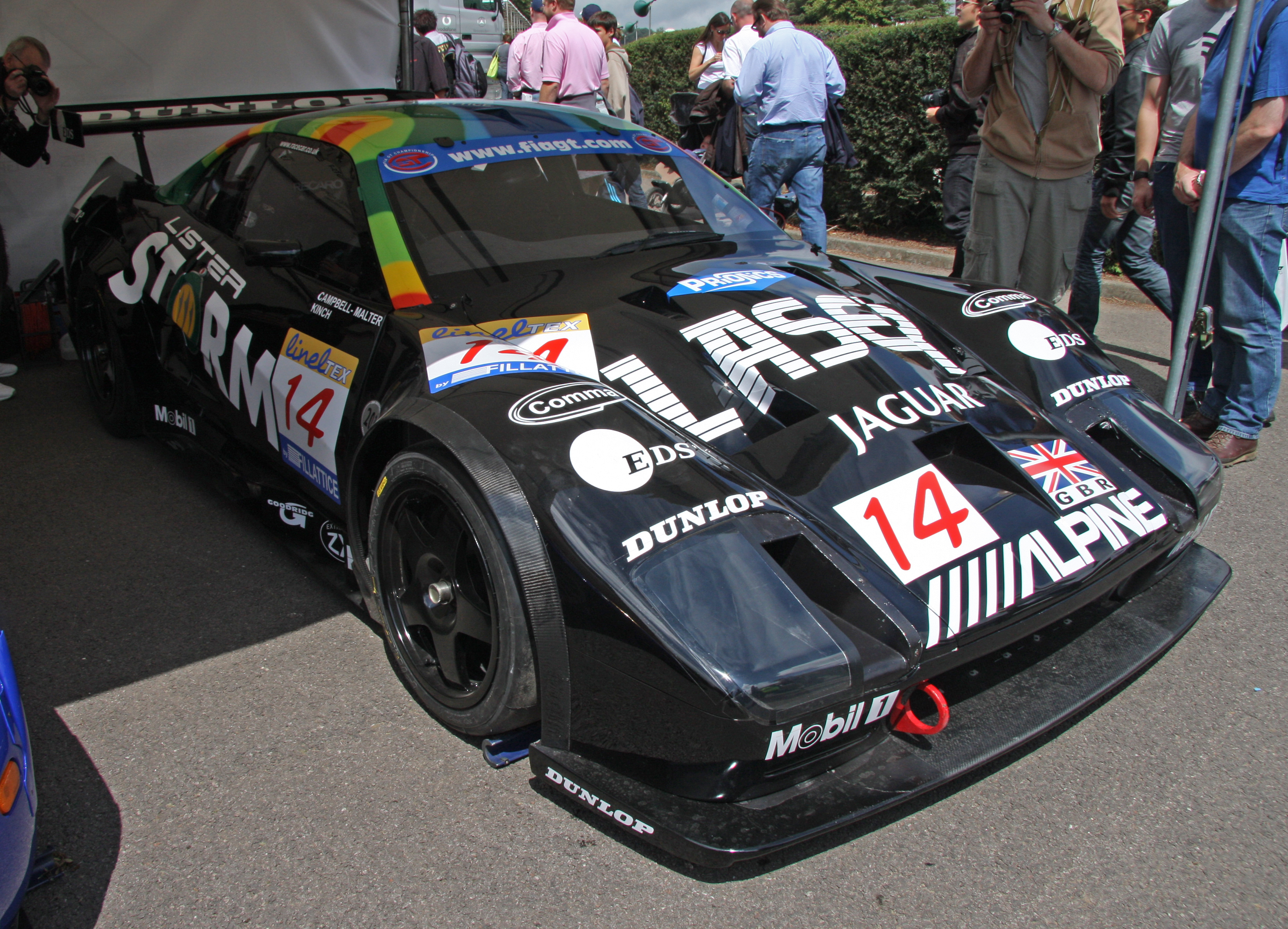 Built 2001. 7 litre V12